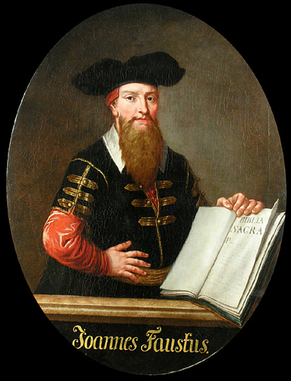 Idealporträt des Mainzer Verlegers Johannes Fust (um 1400–1466))title QS:P1476,de:"Idealporträt des Mainzer Verlegers Johannes Fust (um 1400–1466))" label QS:Lde,"Idealporträt des Mainzer Verlegers Johannes Fust (um 1400–1466))"